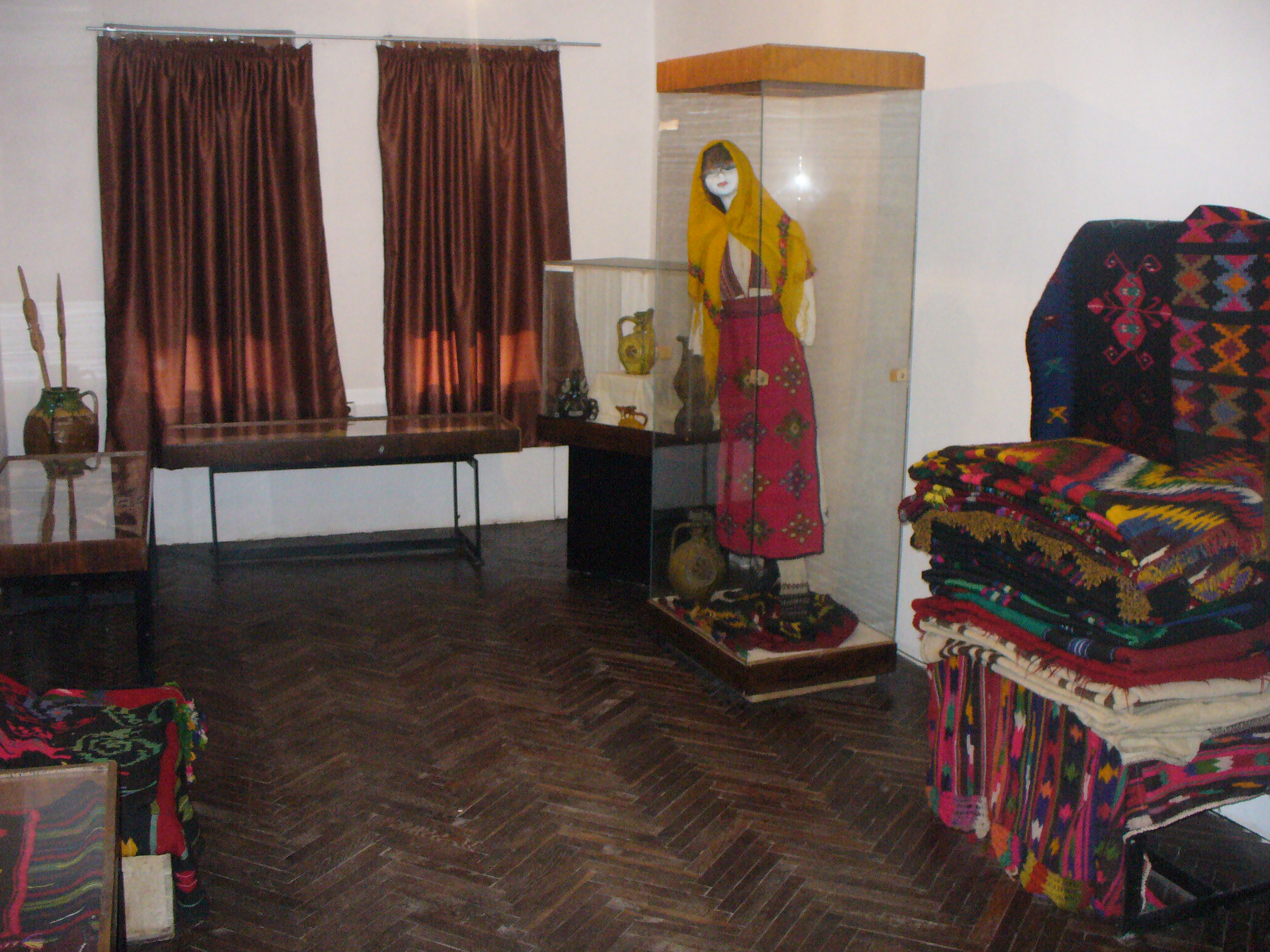 Historical Museum in Melnik, Bulgaria